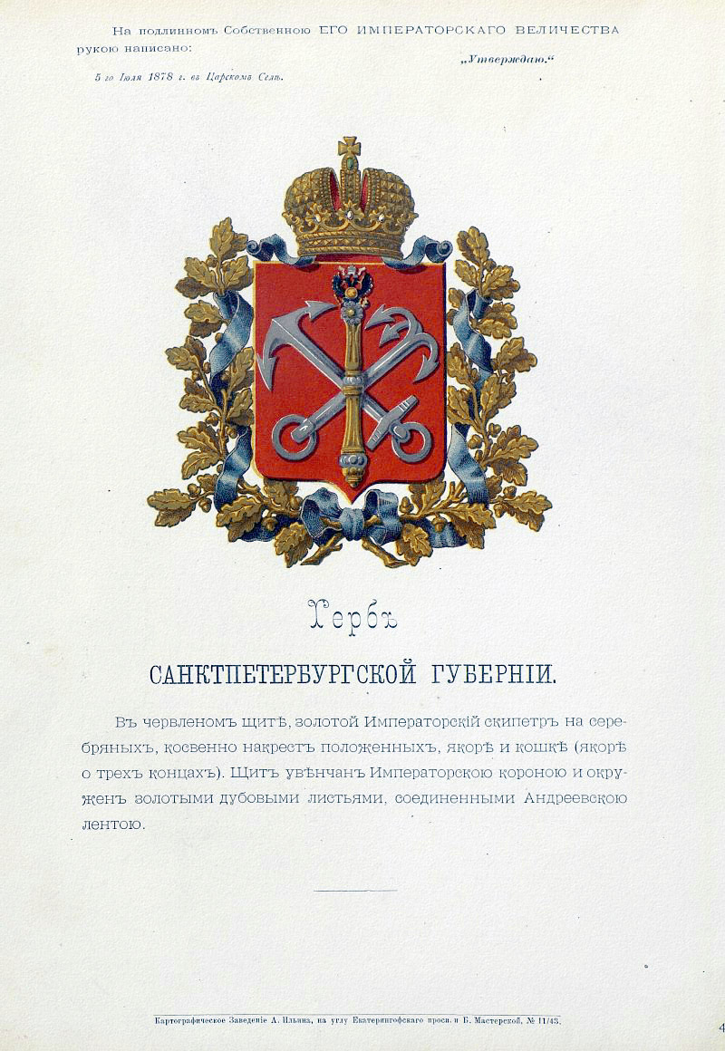 Official Russian Empire coat of arms Saint-Petersburg Governorate. Герб Российской Империи Санктпетербургской губернии с официальным описанием в Гербовнике Бенке. Утверждён Императором Всероссийским Александром Вторым.